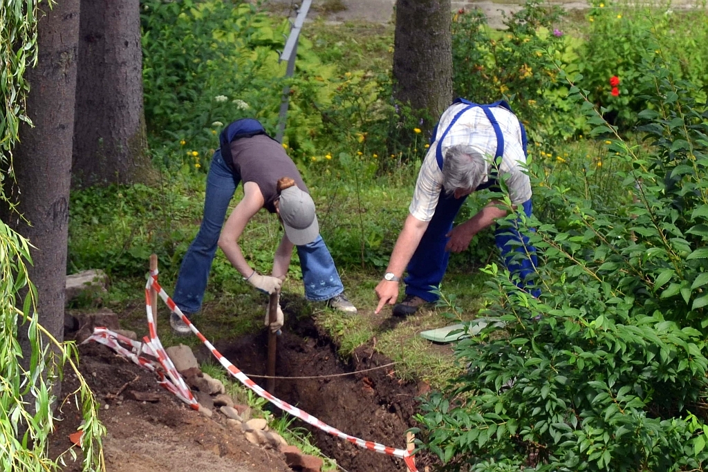 Archäologen bei der Arbeit in Sanok